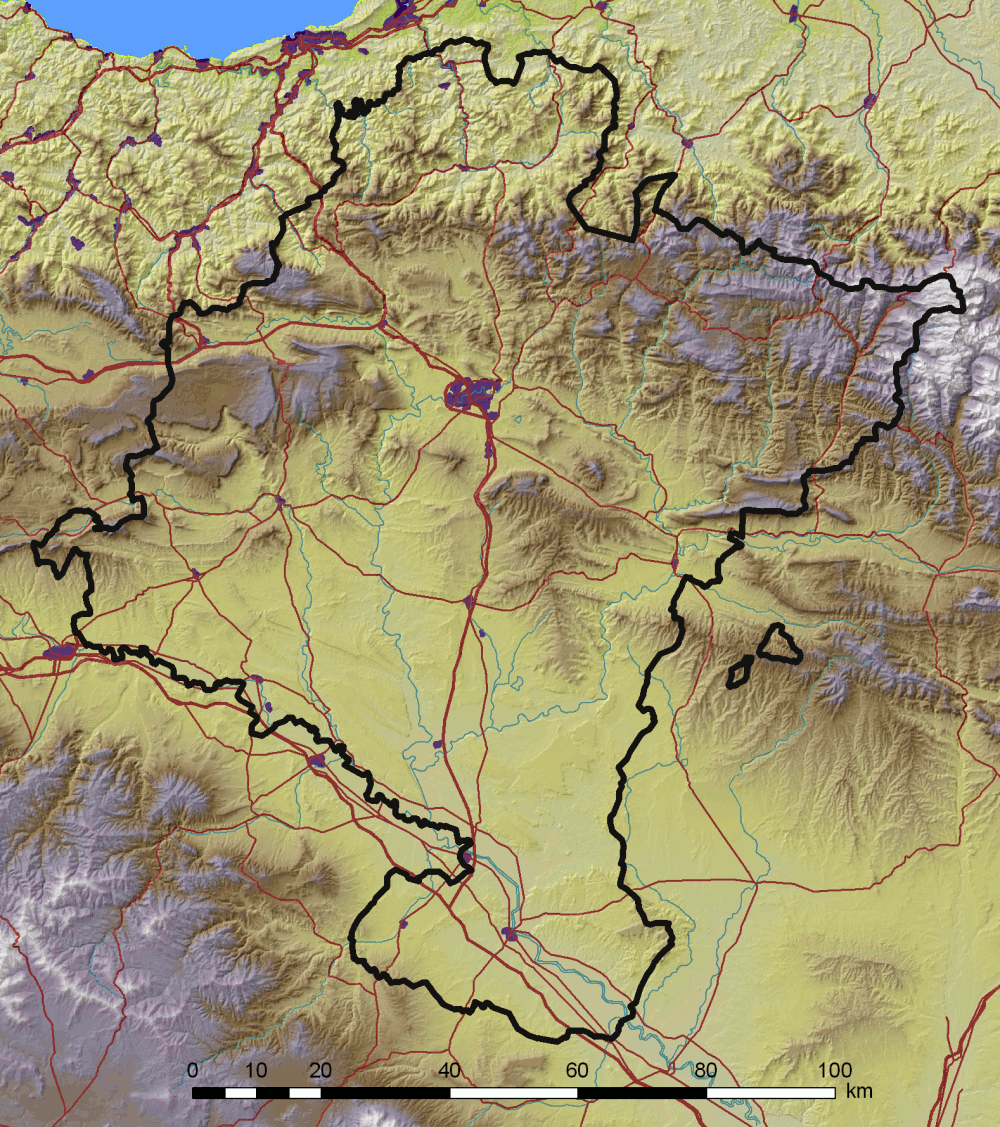 Nafarroa Garaiaren mapa fisikoa